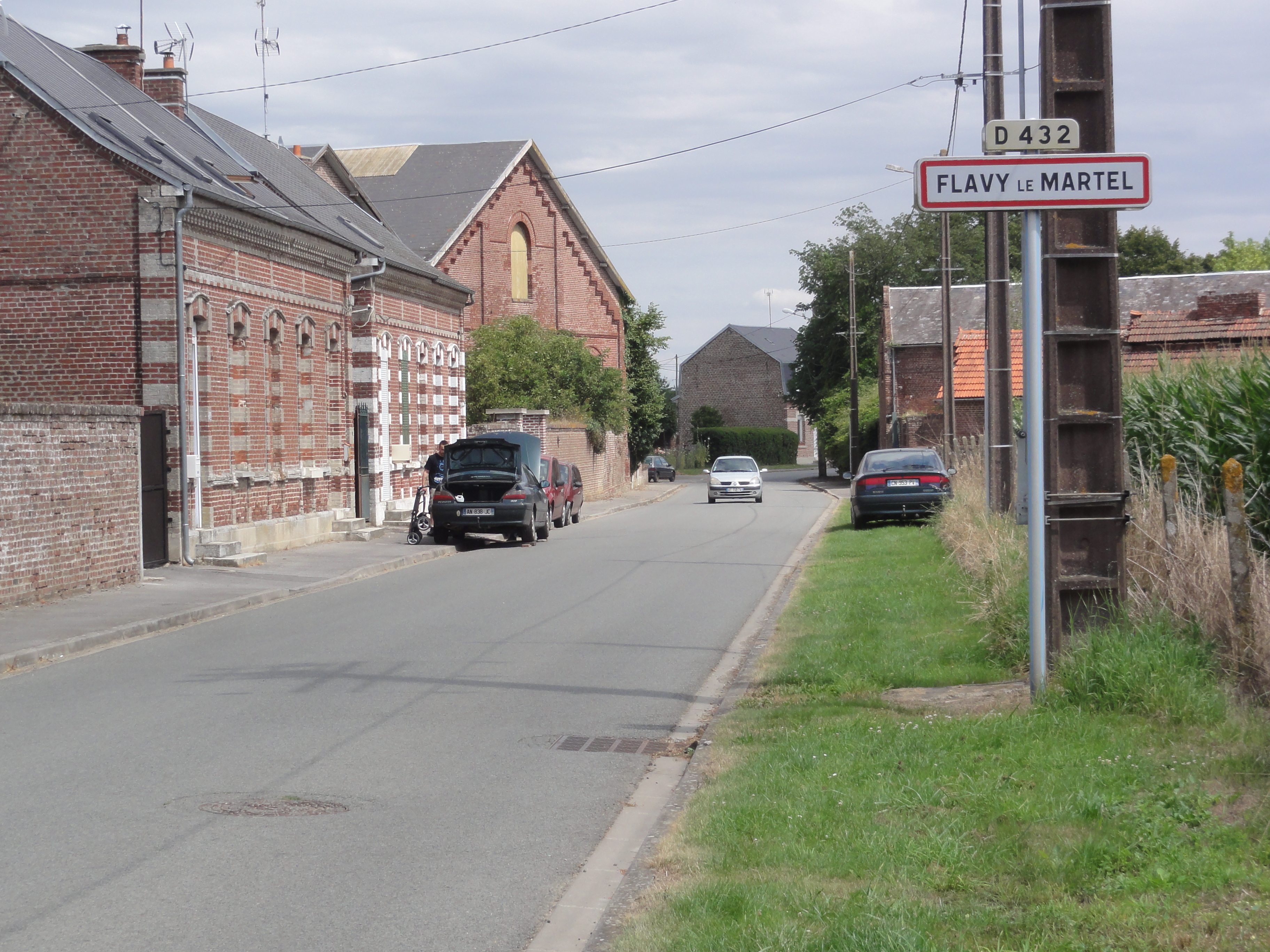 Flavy-le-Martel (Aisne) city limit sign